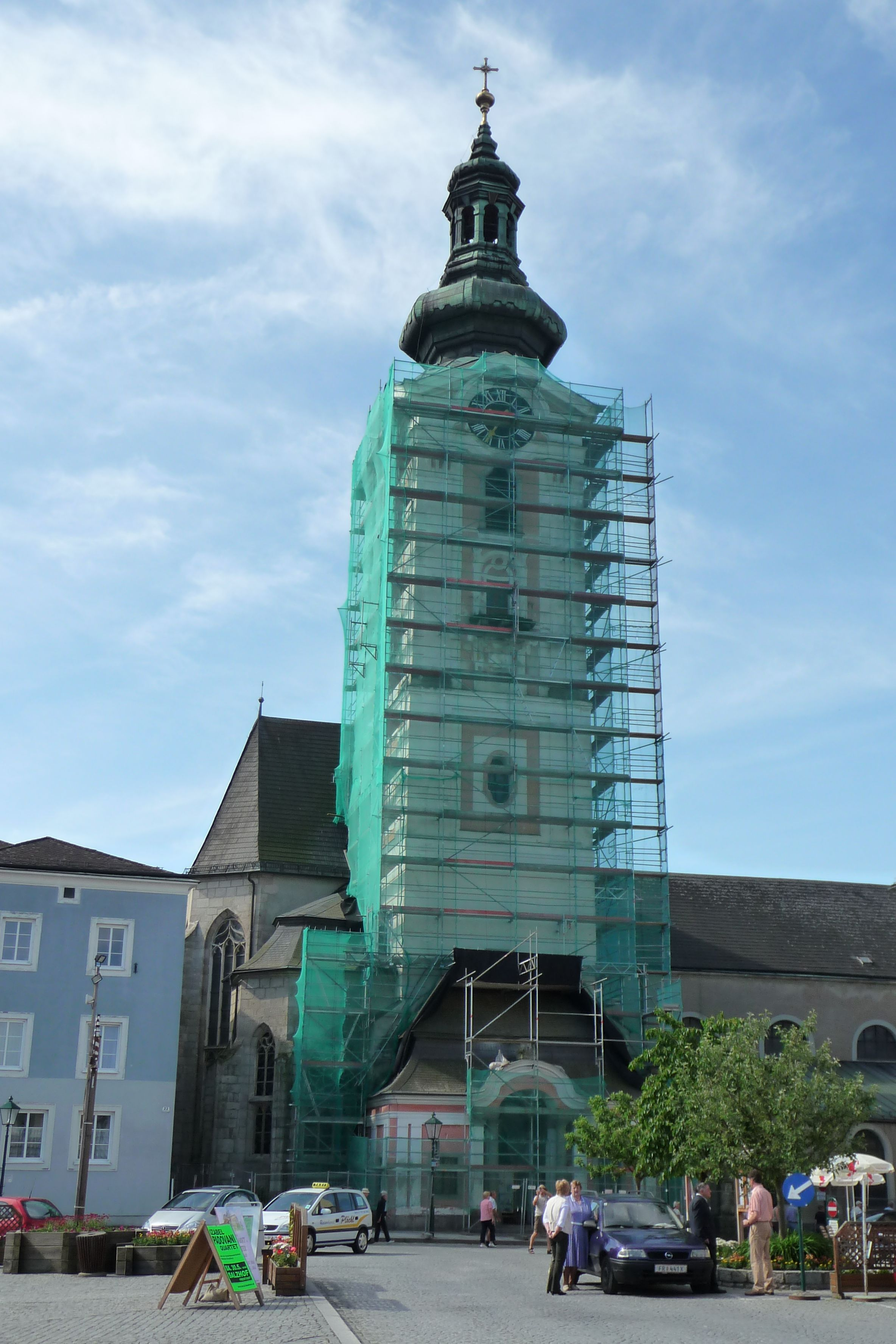 Kirchturm in Gerüst, Stadtpfarrkirche Freistadt